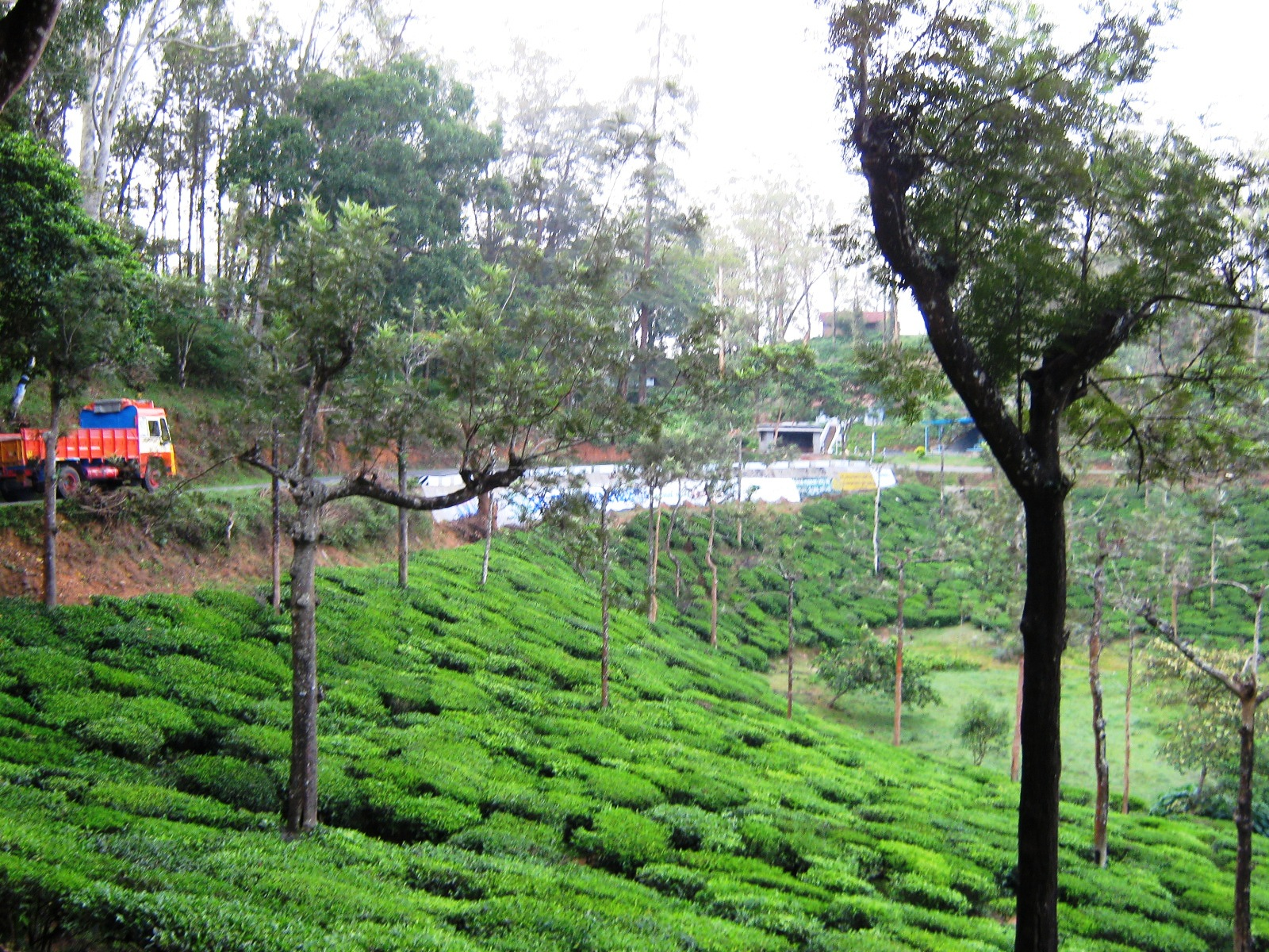 Nilgiris, Tamil Nadu, India.